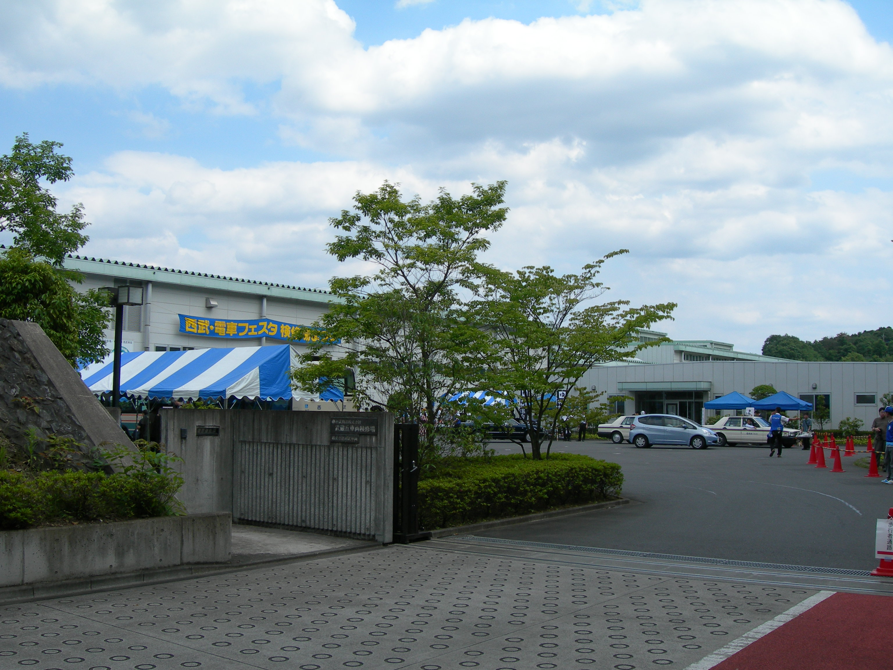 西武鉄道 武蔵丘車両検修場